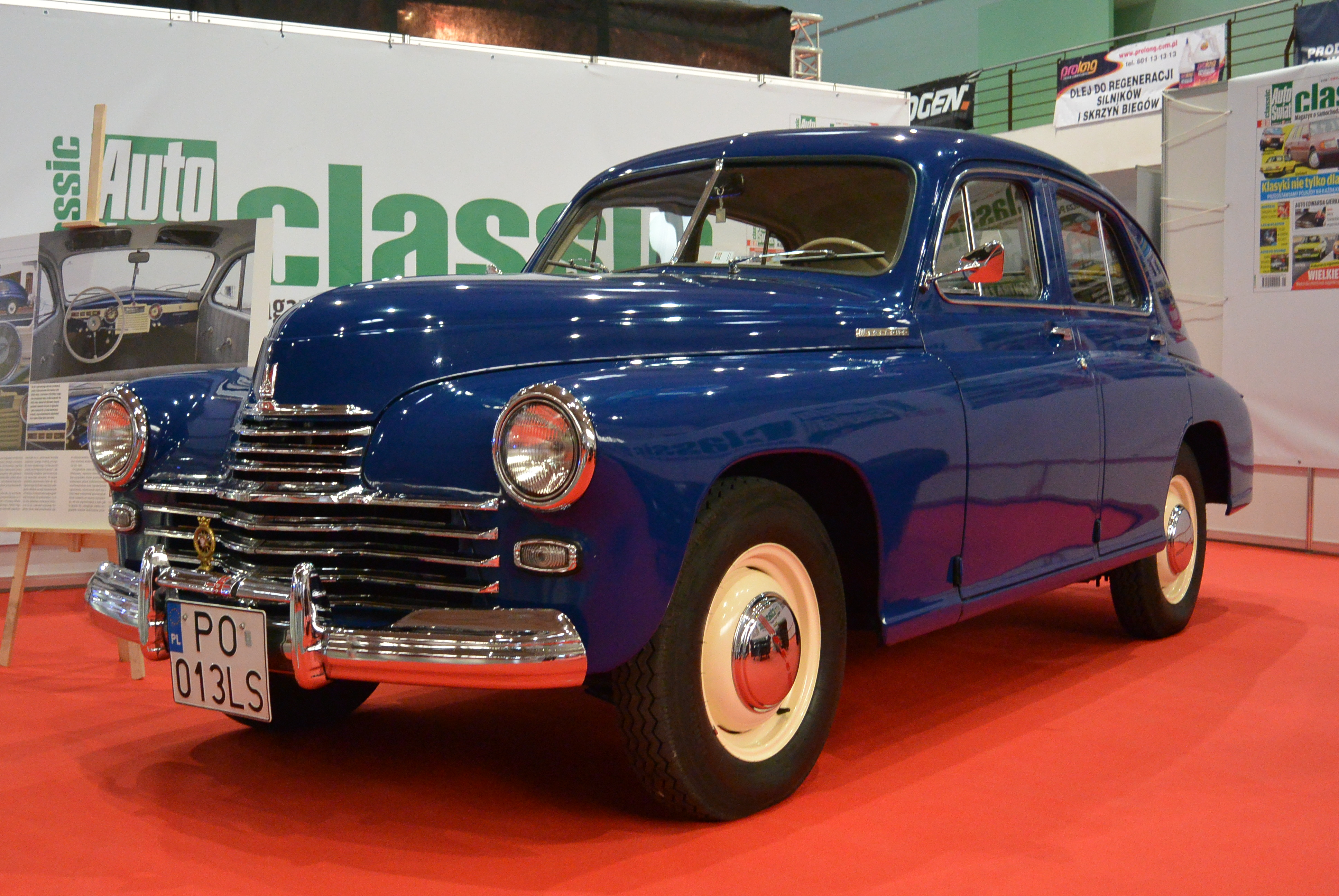 FSO Warszawa M-20 podczas Motor Show Poznań 2014.